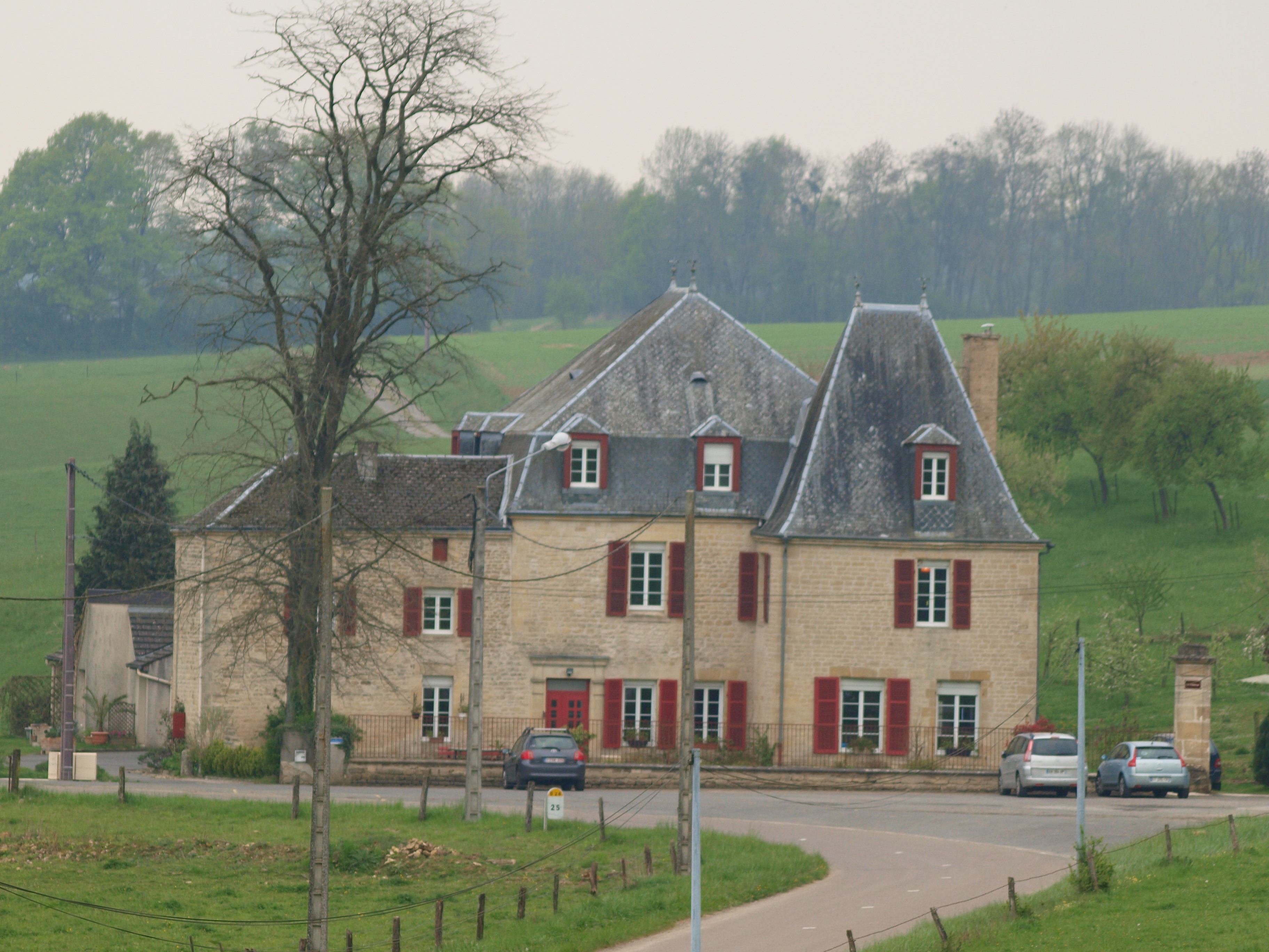 Lametz (Ardennes, France) ; château